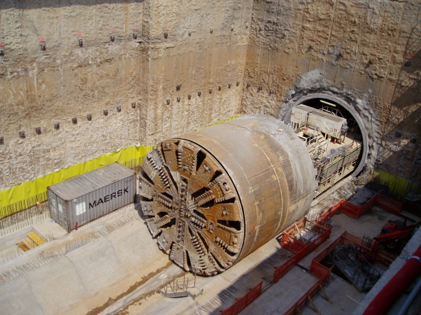 Talpa della metro.bs presso la costruenda stazione della Volta.